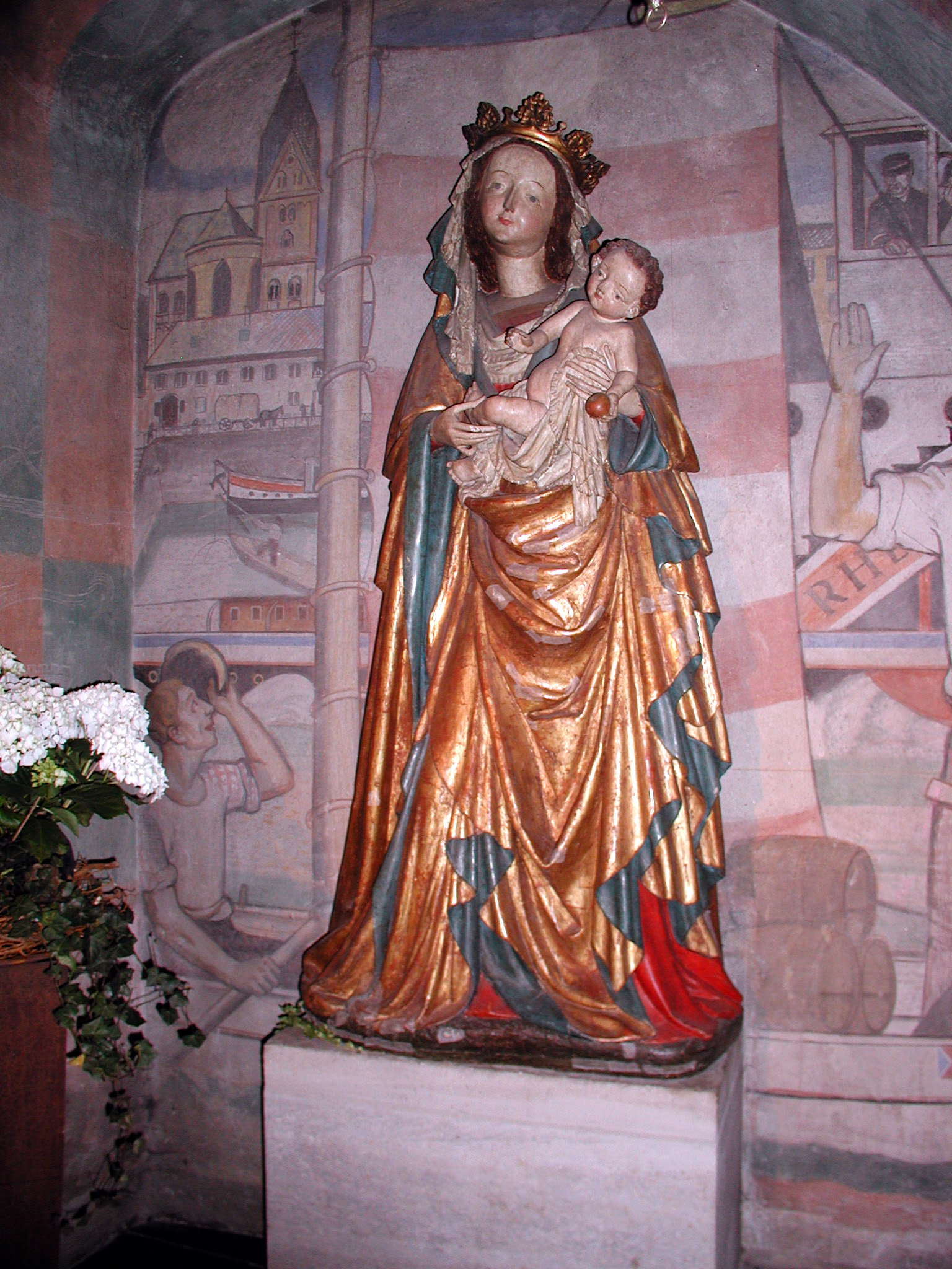 St. Maria Lyskirchen, Köln. Madonna vor alter Kirchendarstellung